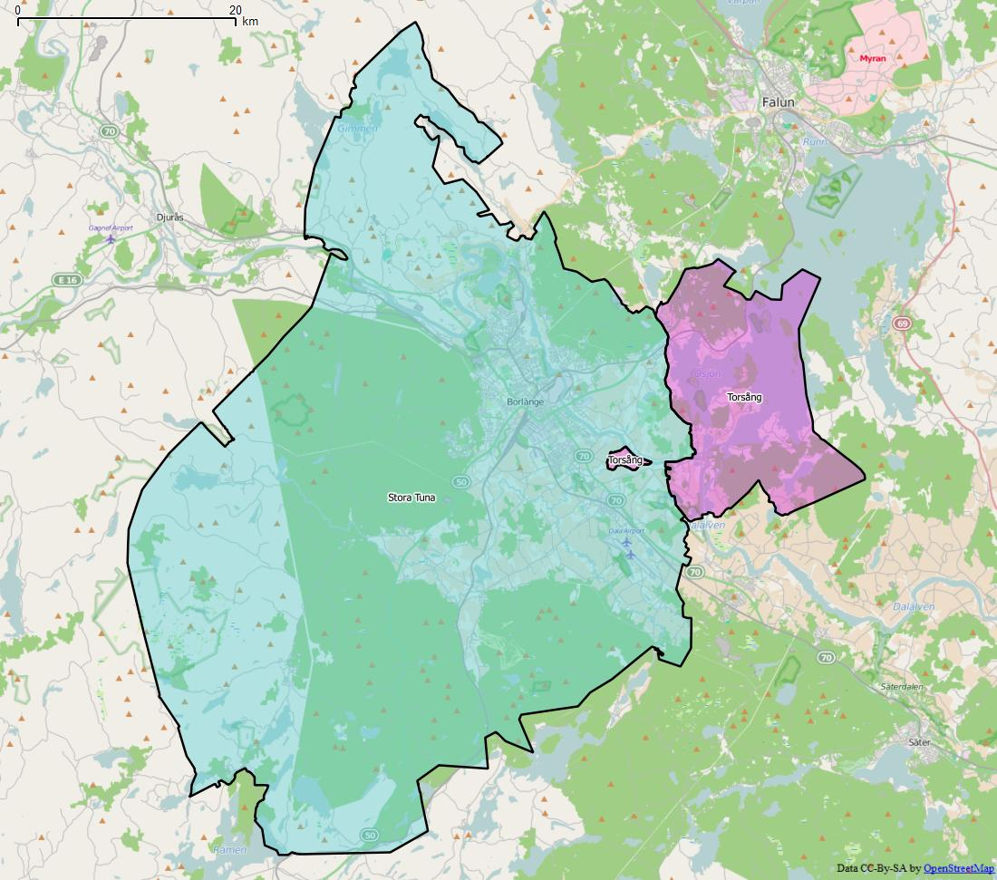 Distriktsindelningen i Borlänge kommun